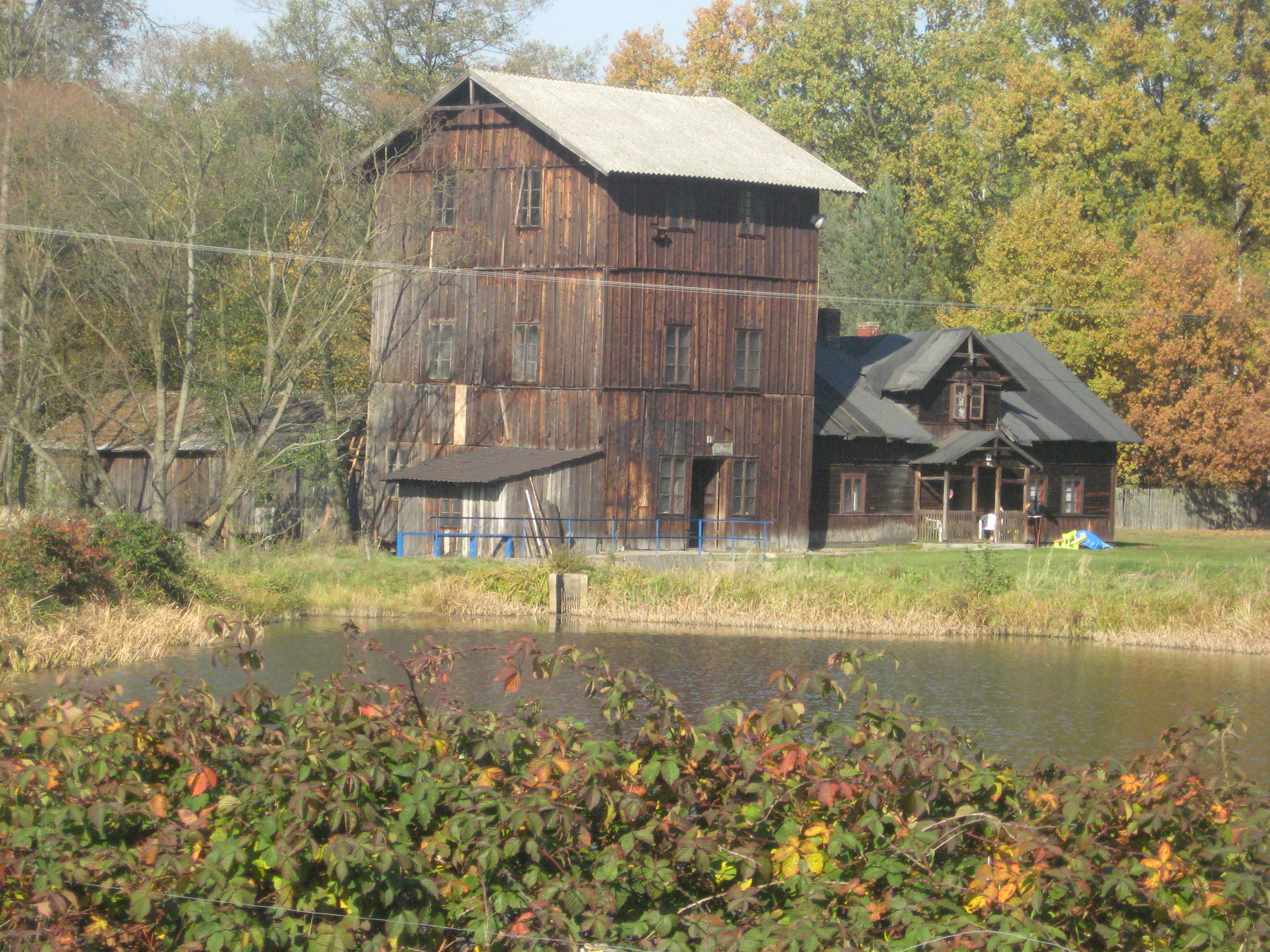 Kluczno, czynny drewniany młyn wodny.